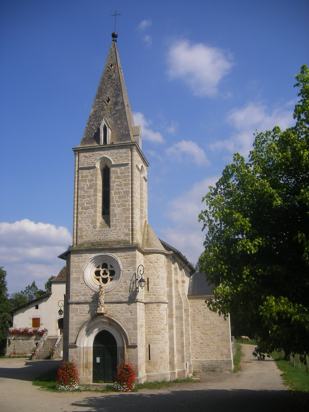 Boussac